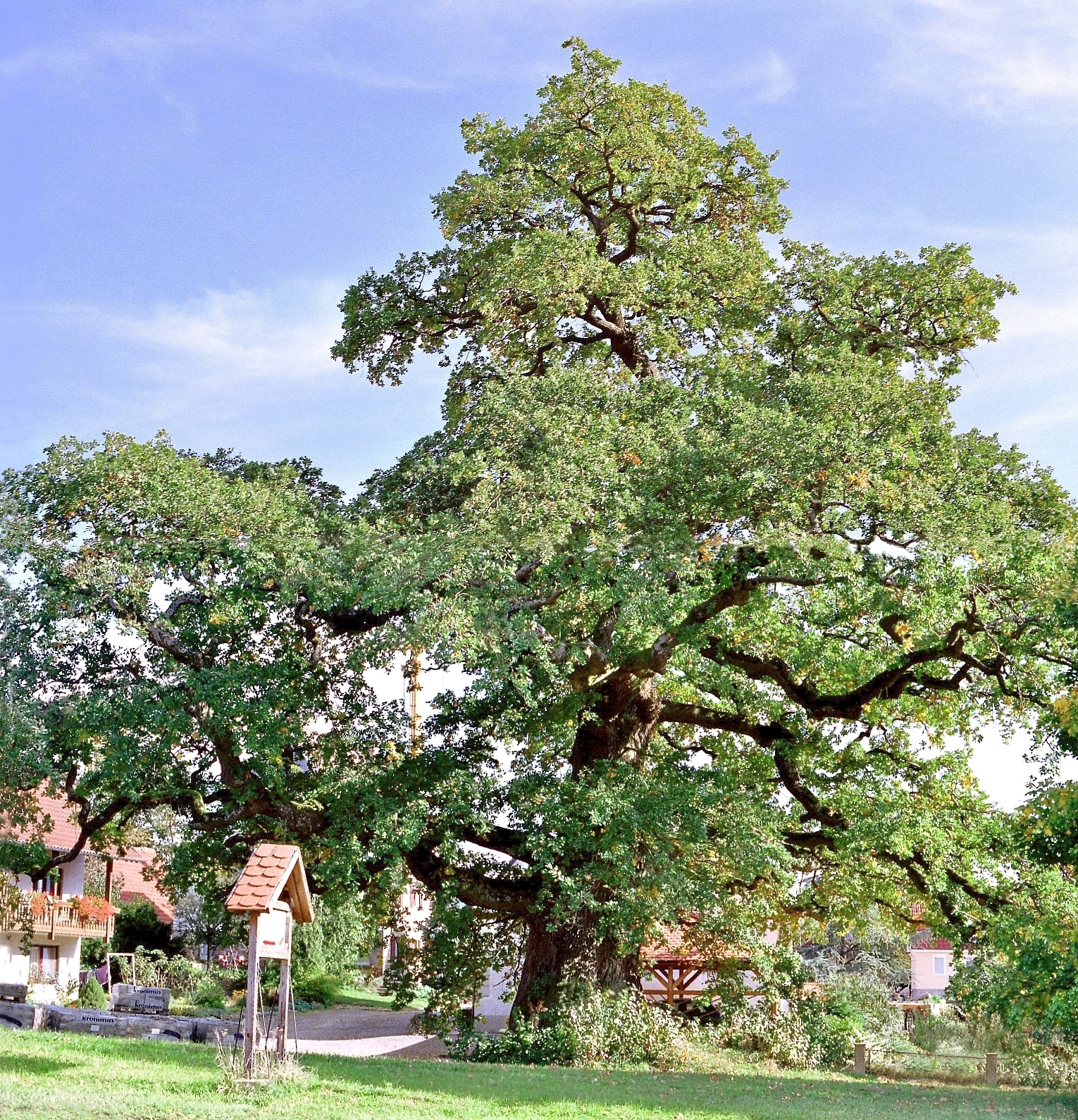 Die Eiche am Emmertshof, eine alte Stieleiche (Quercus robur) in Neuenstein (Hohenlohe)